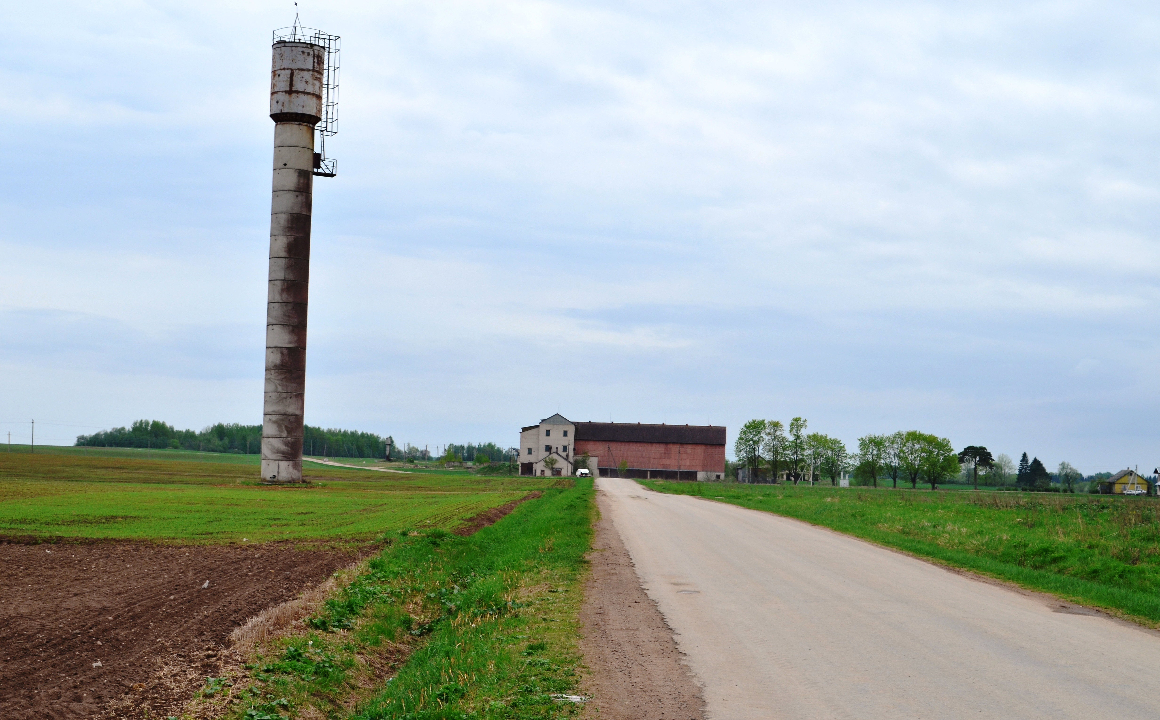 Pajieslio fermų griuvėsiai. Diksiai, Krakių sen., Kėdainių r.